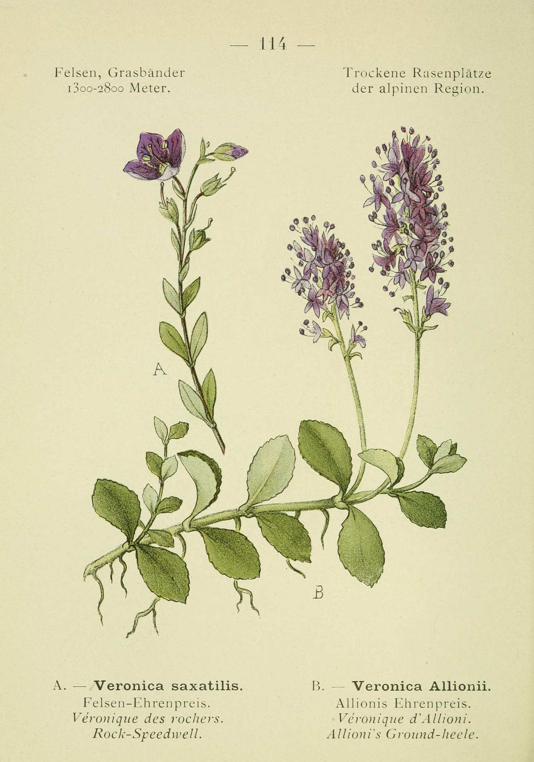 Alpen-Flora : Westalpen / von G. Senn ; mit 144 farbigen Tafeln nach am Standorte gemalten Aquarellen von C. Kaftner.